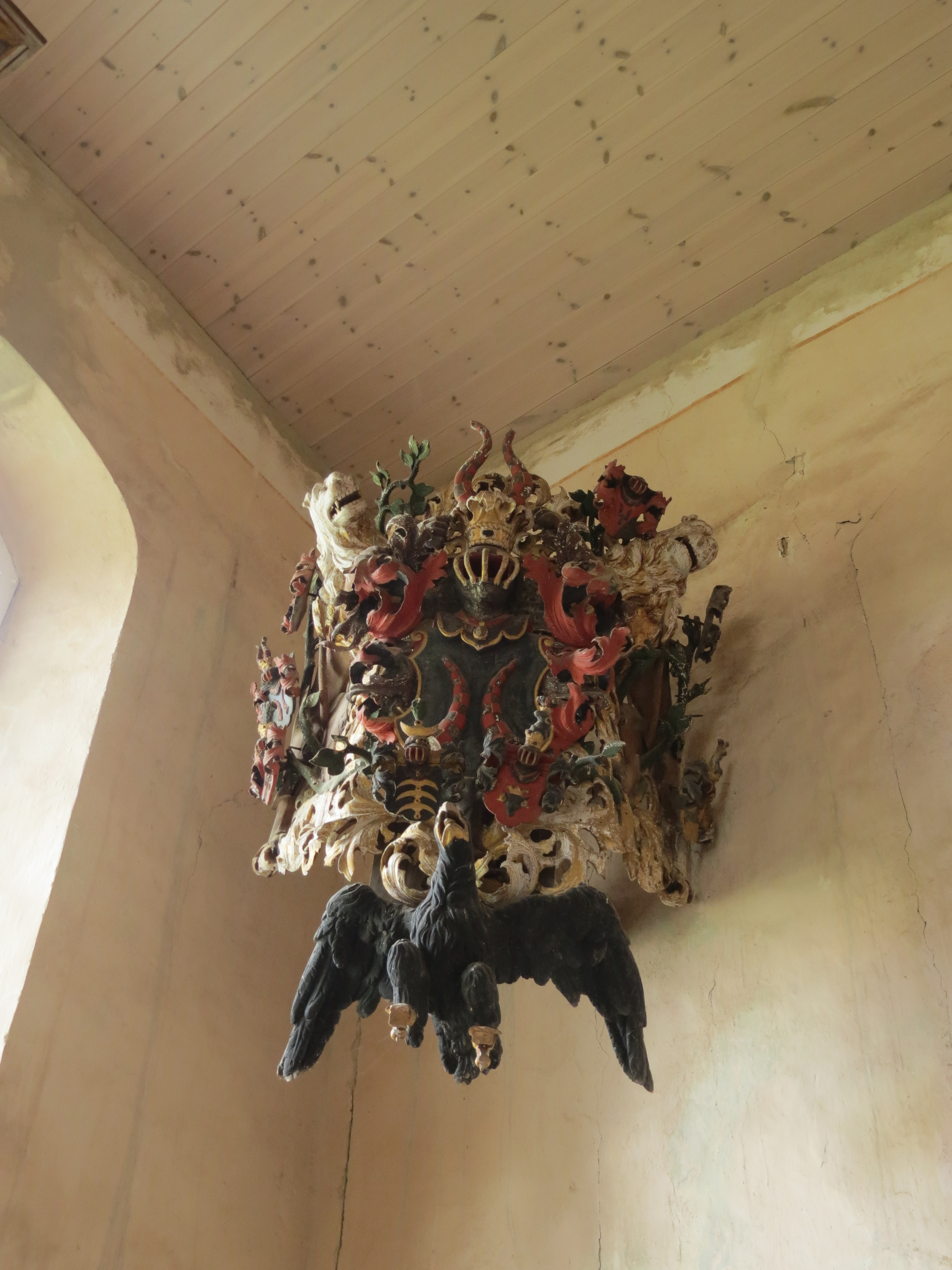 Dorfkirche Laubst, Ortsteil Laubst, Stadt Drebkau, Landkreis Spree-Neiße, Brandenburg, Innenraum, Totenschild des Johann Adolf von Nostitz